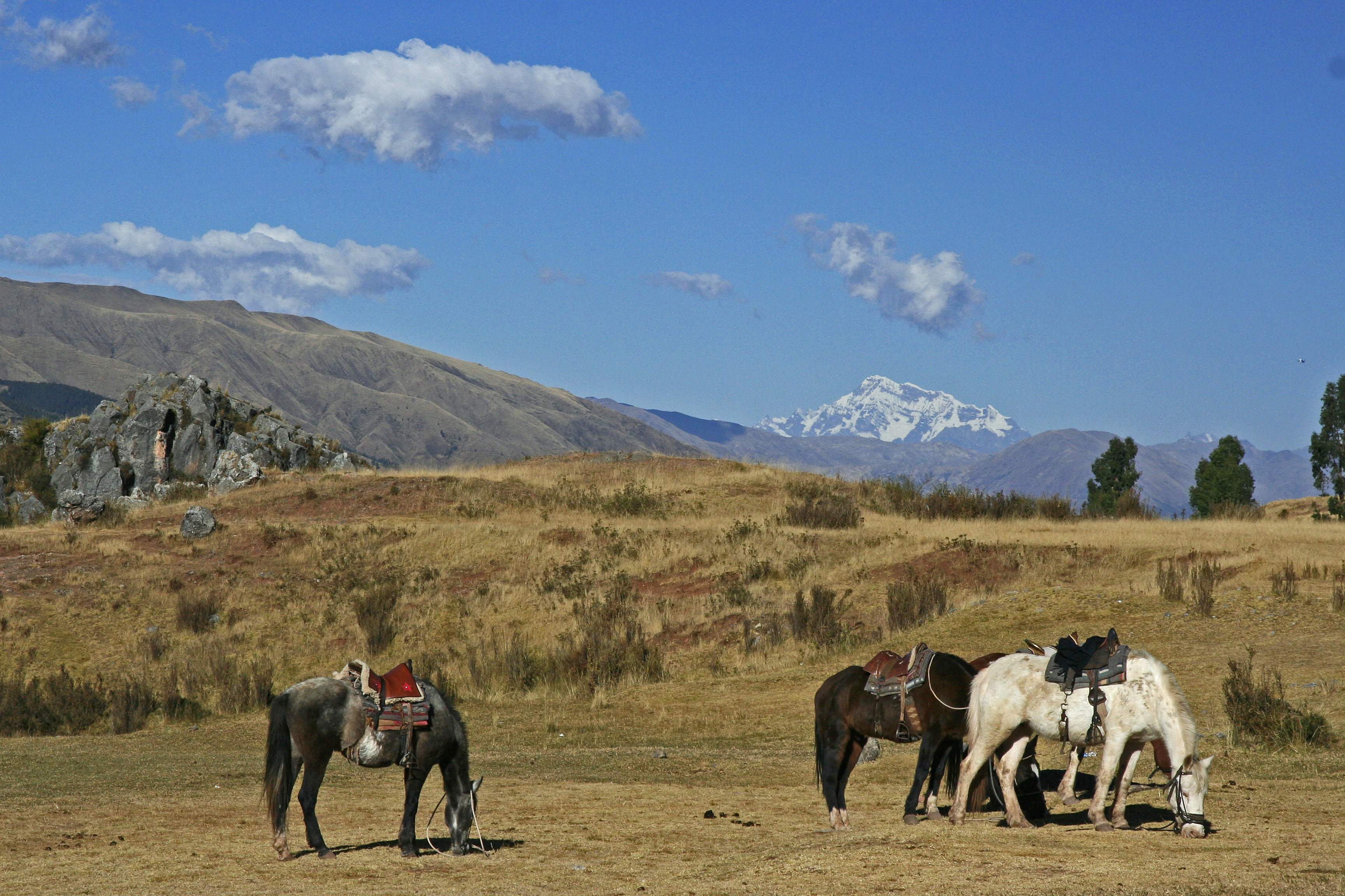 Horses in Peru